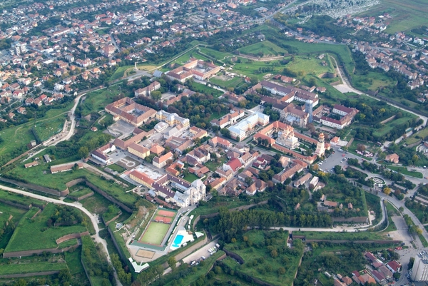 Vedere generala a Ceţii Alba Carolina emblema oraşului Alba Iulia 01